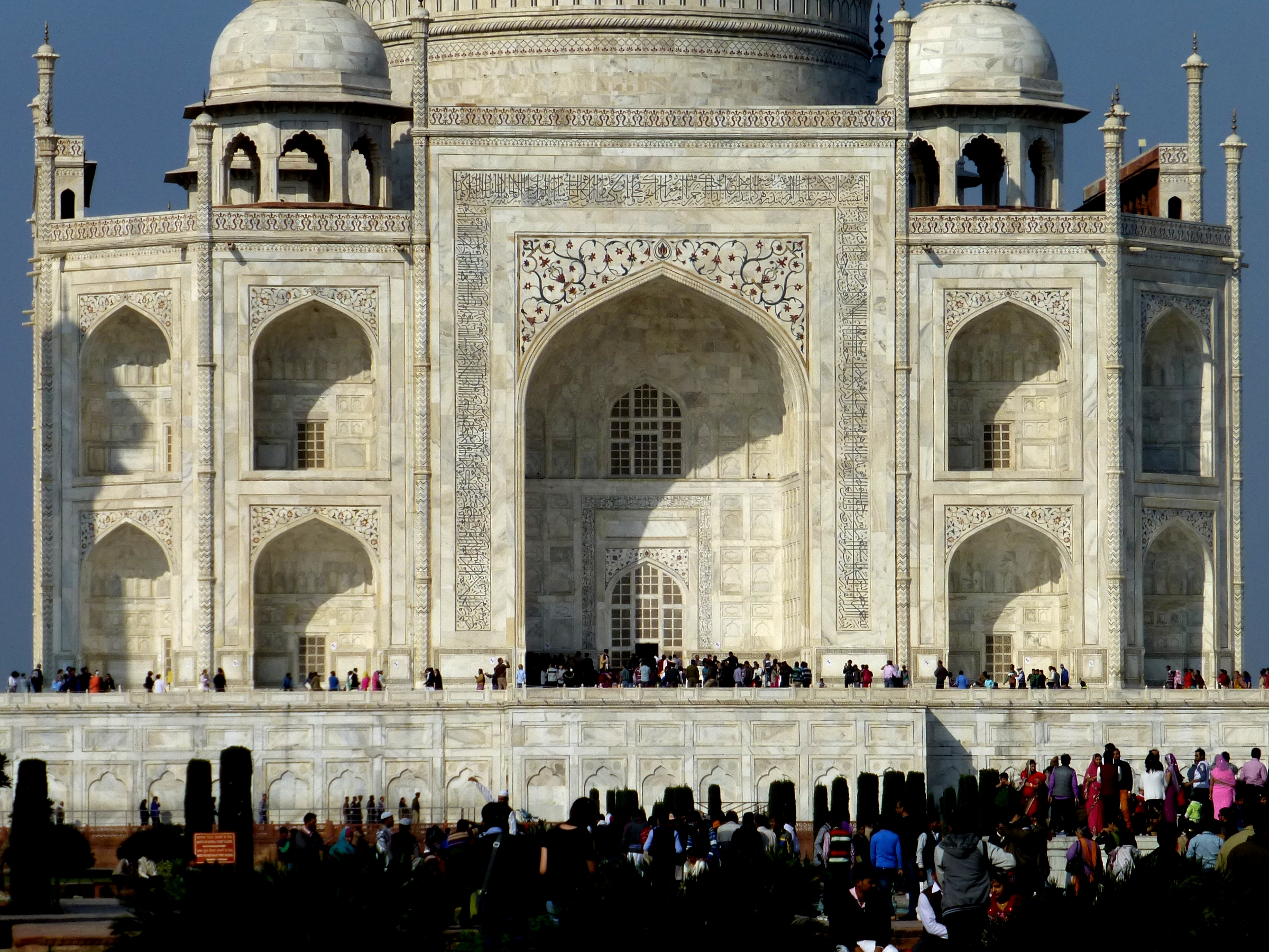 Taj Mahal Agra India